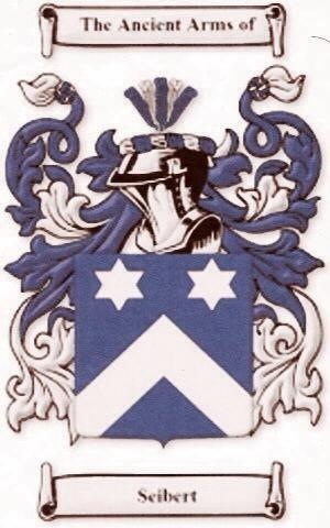 Seibert Family Shield